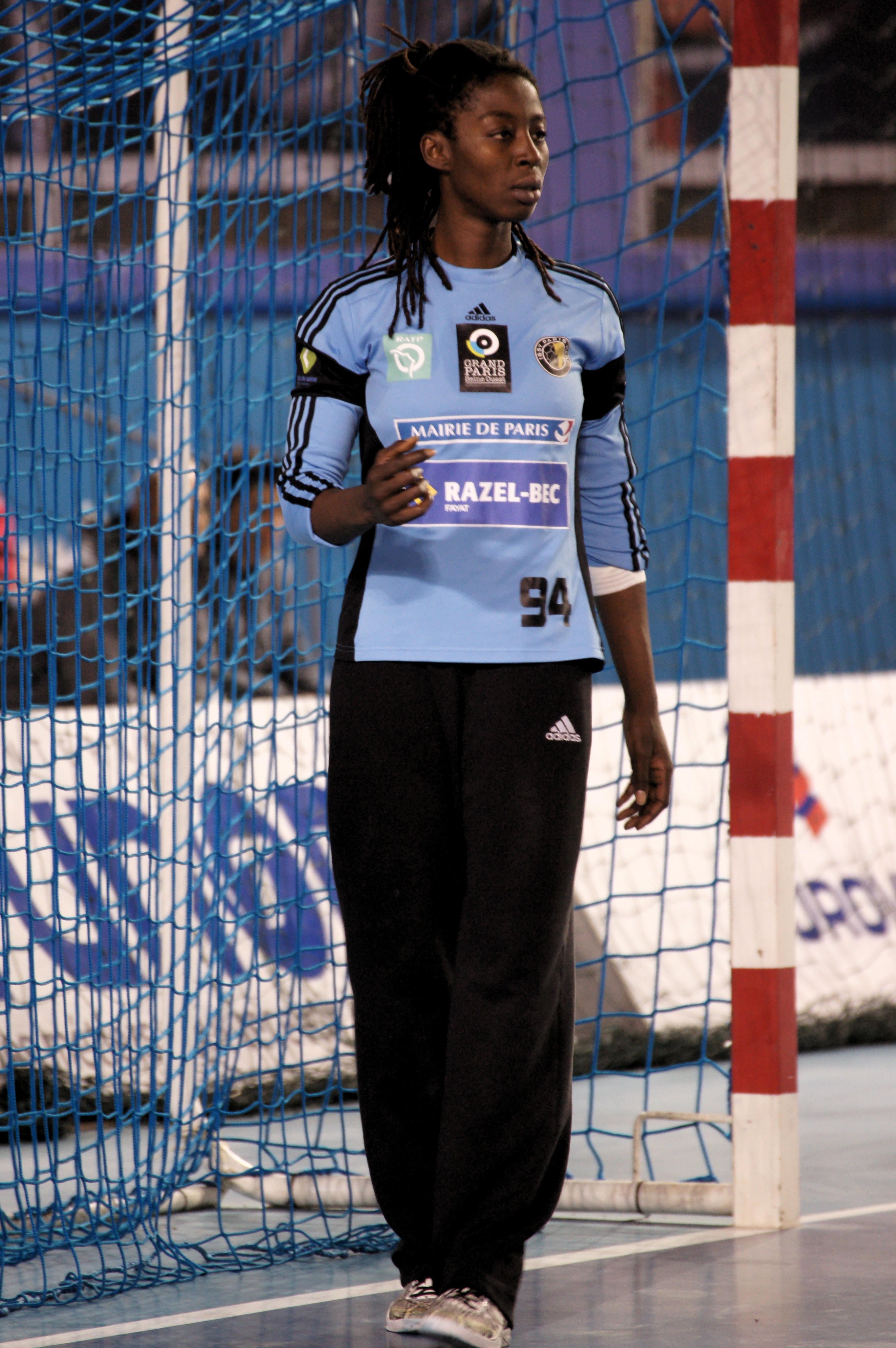 Armelle Attingré, OGCN-Issy 2016